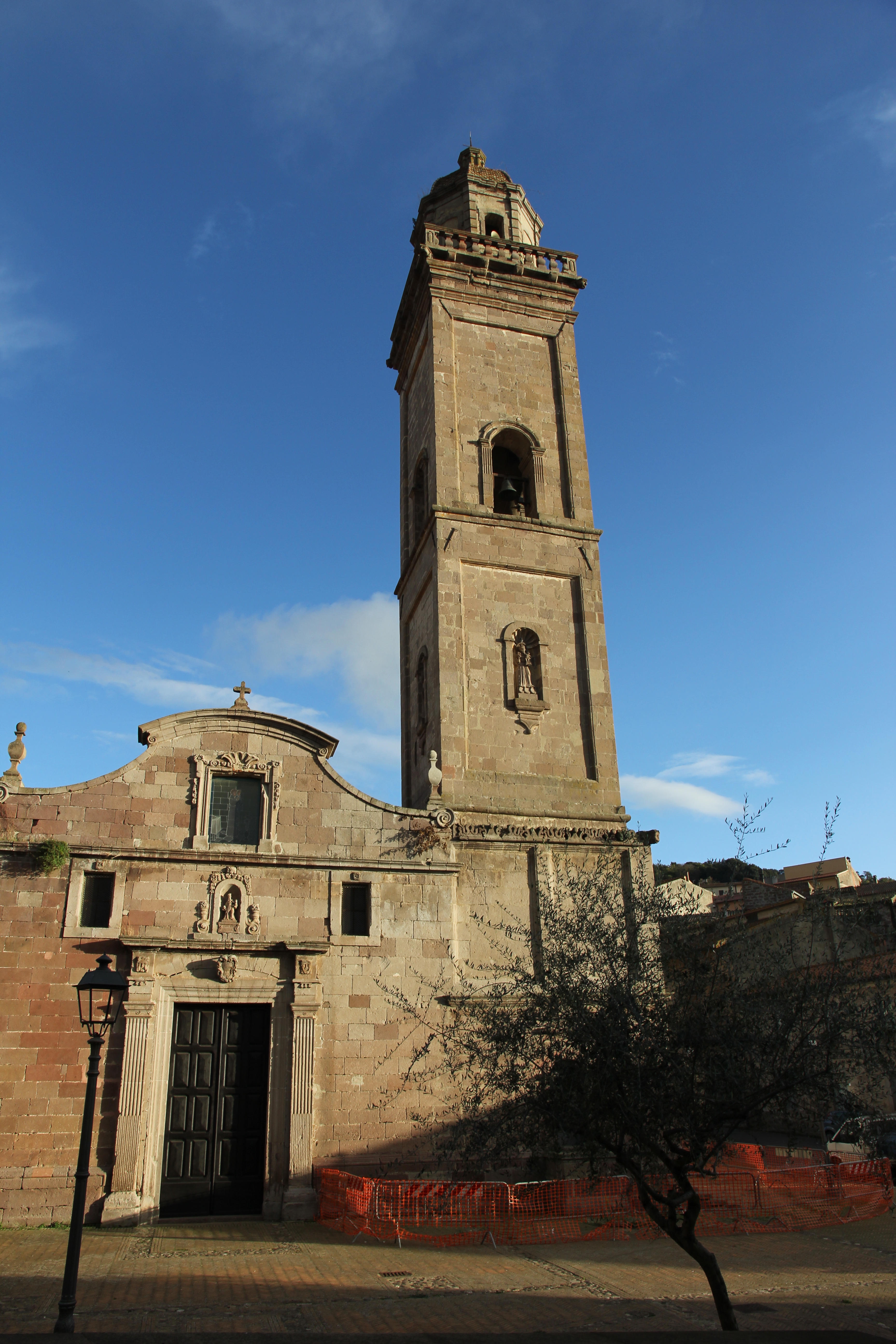 Busachi - Chiesa di Sant'Antonio da Padova